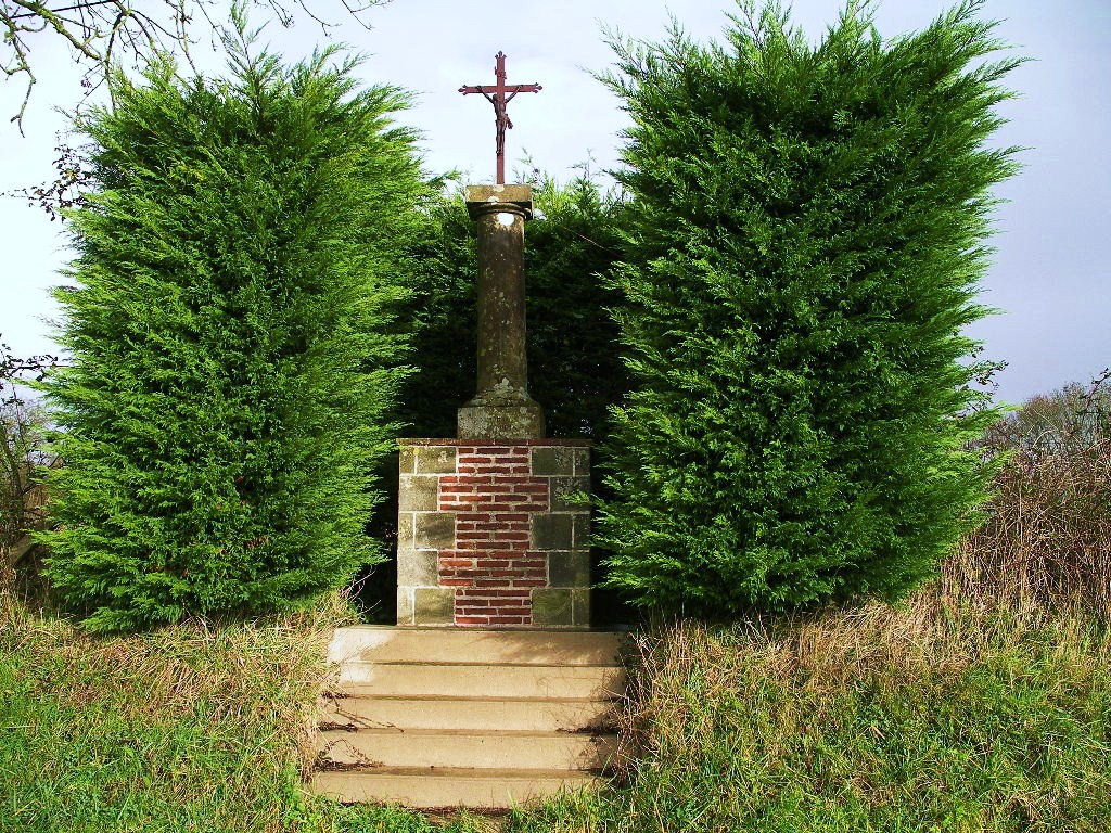 Croix de chemin dite Croix Rollon au carrefour de la Croix-d'Heuland, sur la commune de Branville en limite de la commune de Heuland (Calvados)